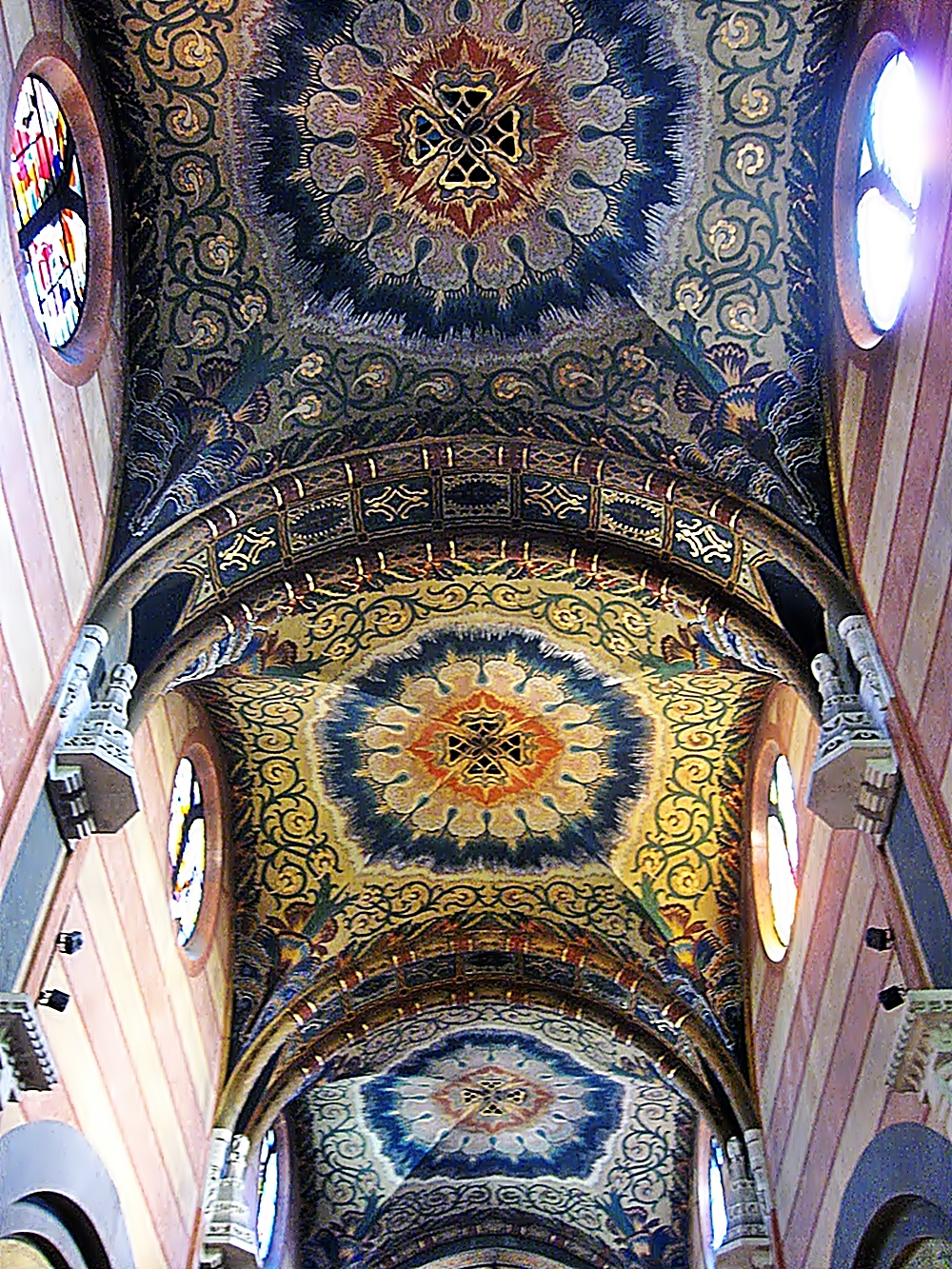 kościół jezuitów